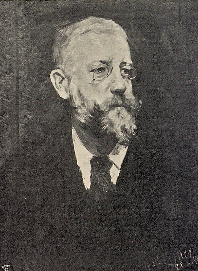 Max Koner: Portrait Hans Müller, Skizze 1895 (Hans Müller: Kunst- und Musikschriftsteller, 1854-1897)